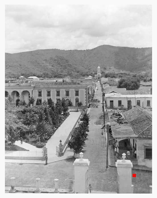 Fotografía tomada desde la parroquia central de la ciudad salvadoreña de Santa Ana, de los últimos años de la década de 1890s, donde se observa el palacio municipal, el edificio original del casino santaneco, y el portal Los Bernales.